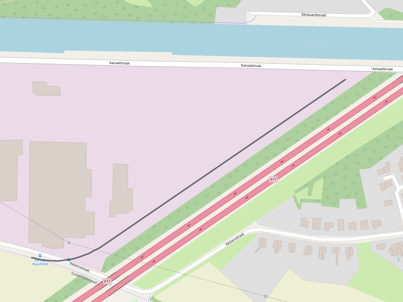 Belgian Railway Line 279, Y Keizerstraat - Harelbeke